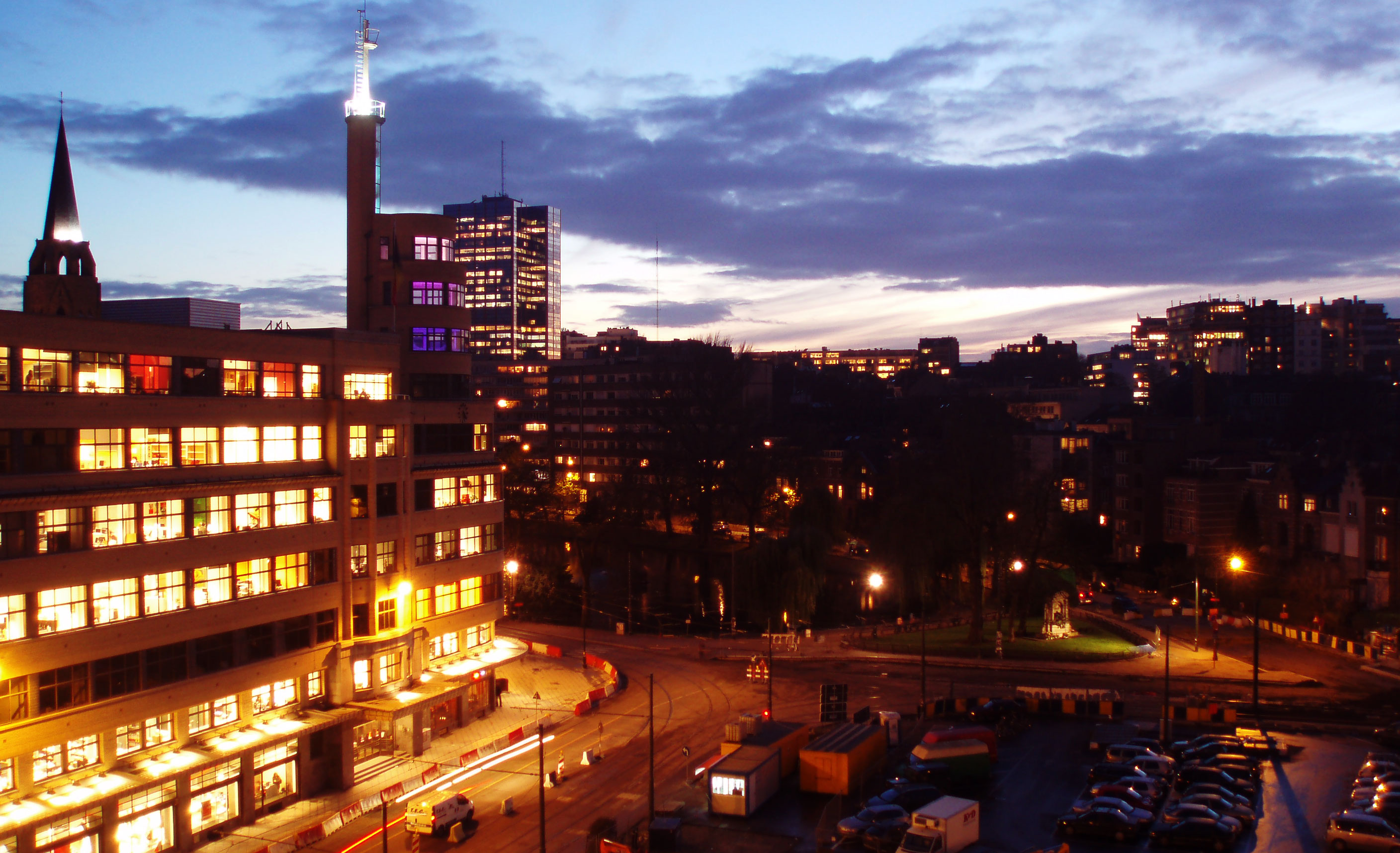 panorama place flagey